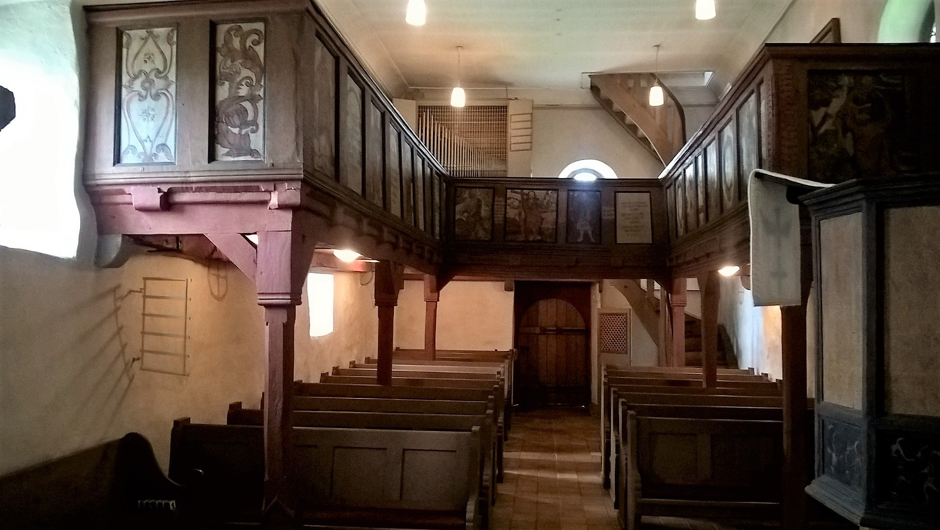 Evangelische Kirche Odenhausen/Lumda, Rabenau, Landkreis Gießen, Hessen, Deutschland